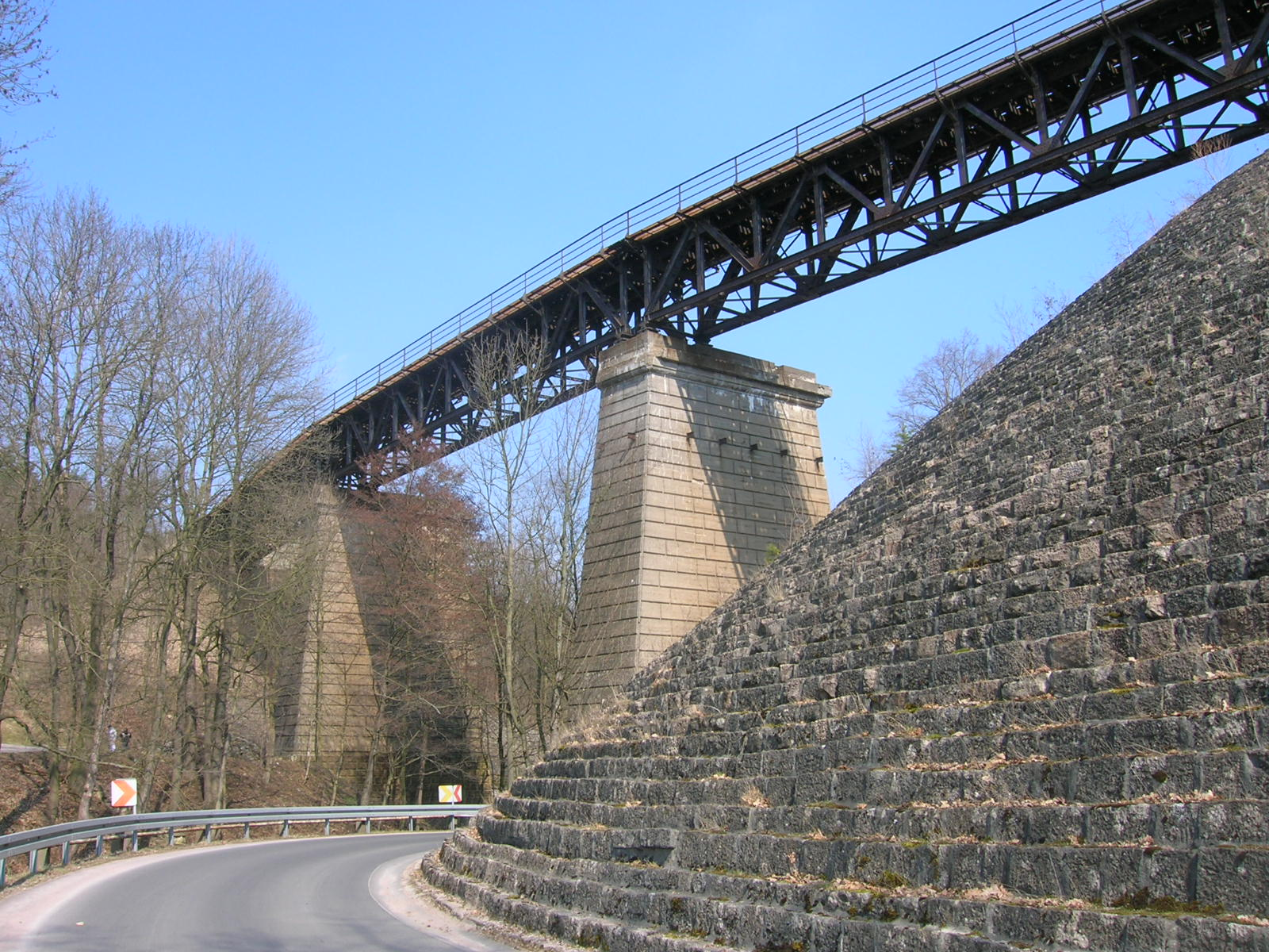 Railway bridge in Angelroda, Ilm-Kreis